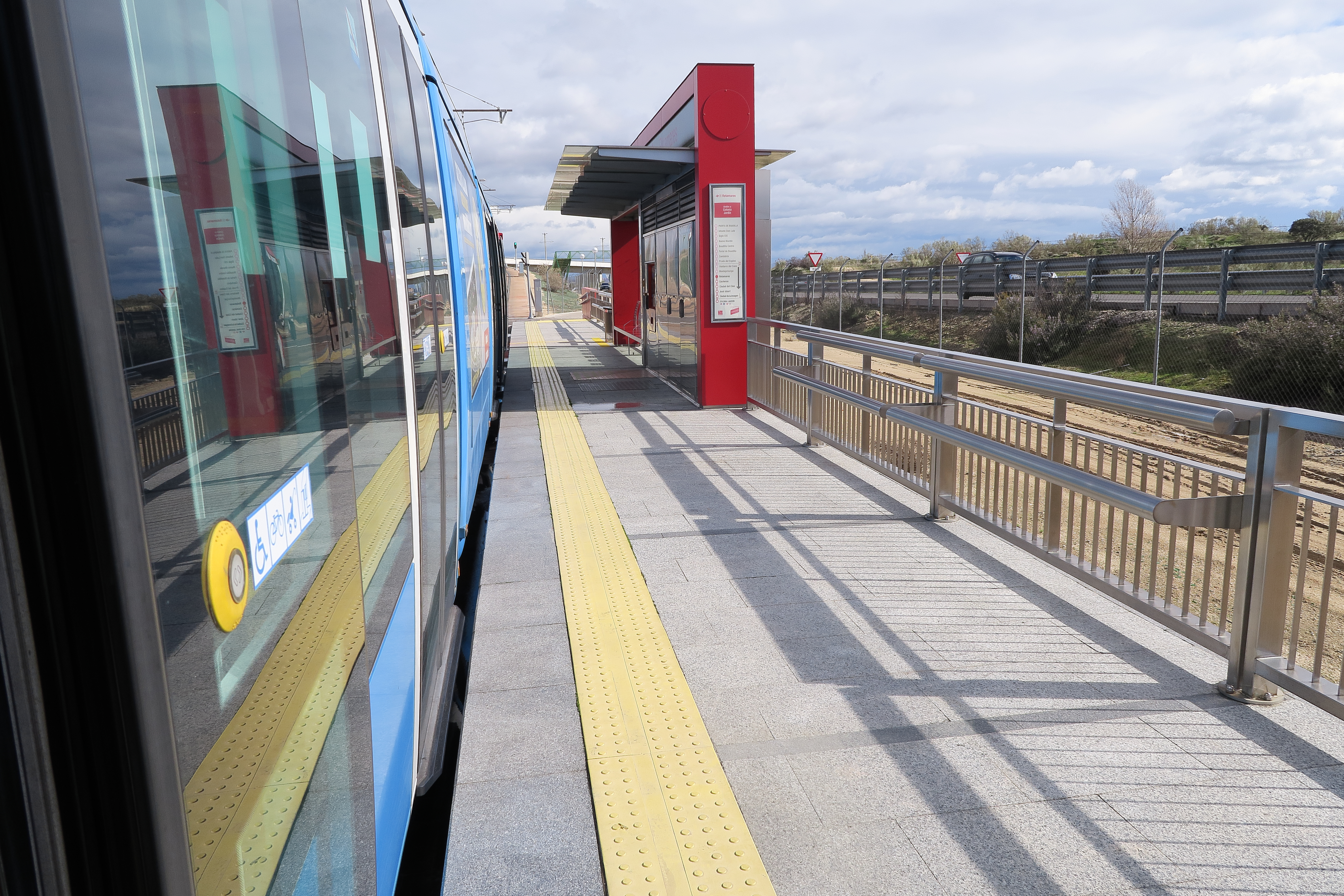 Estación de Retamares